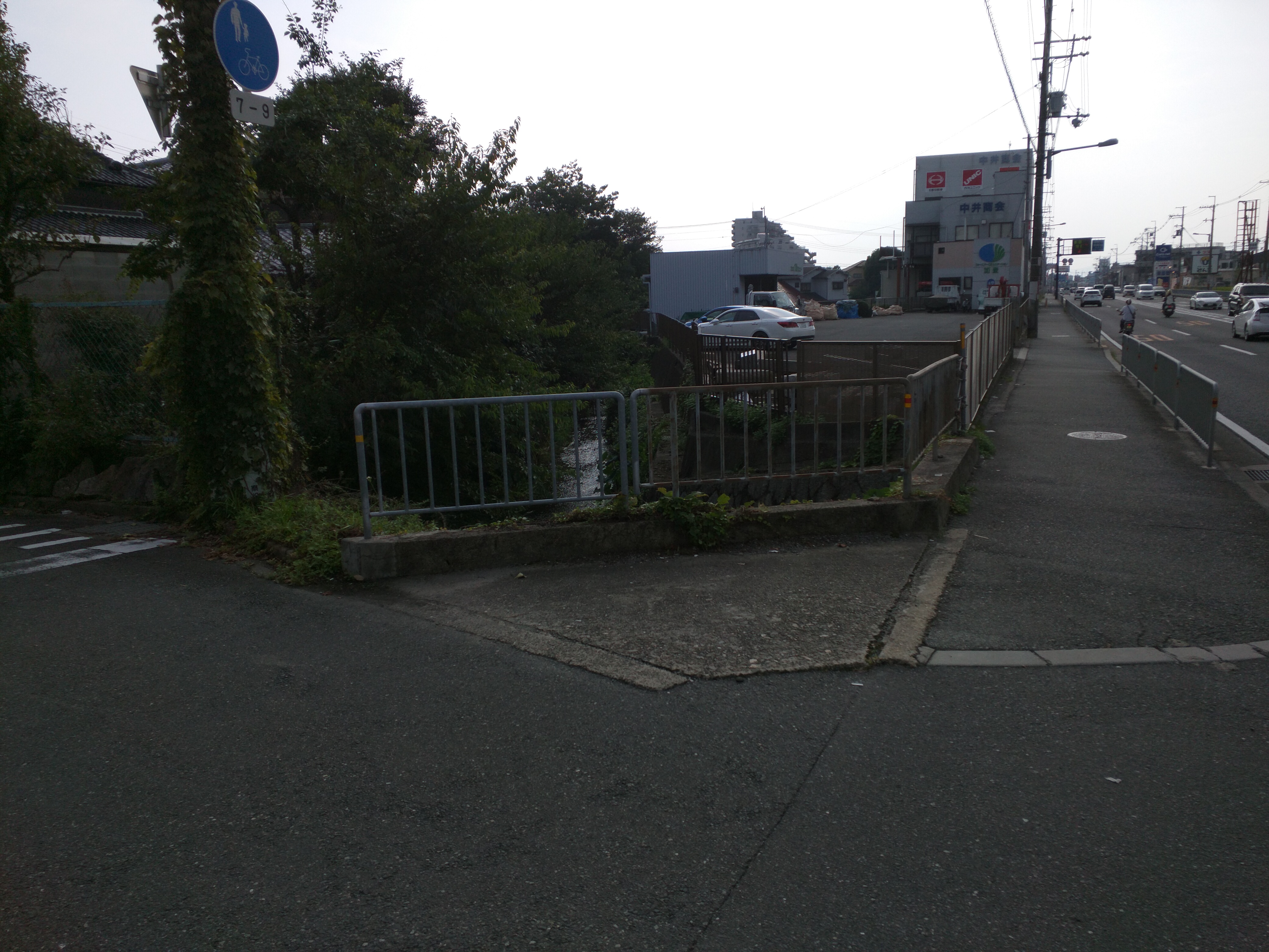 Wikipedia:芋川（大阪府）今宮付近